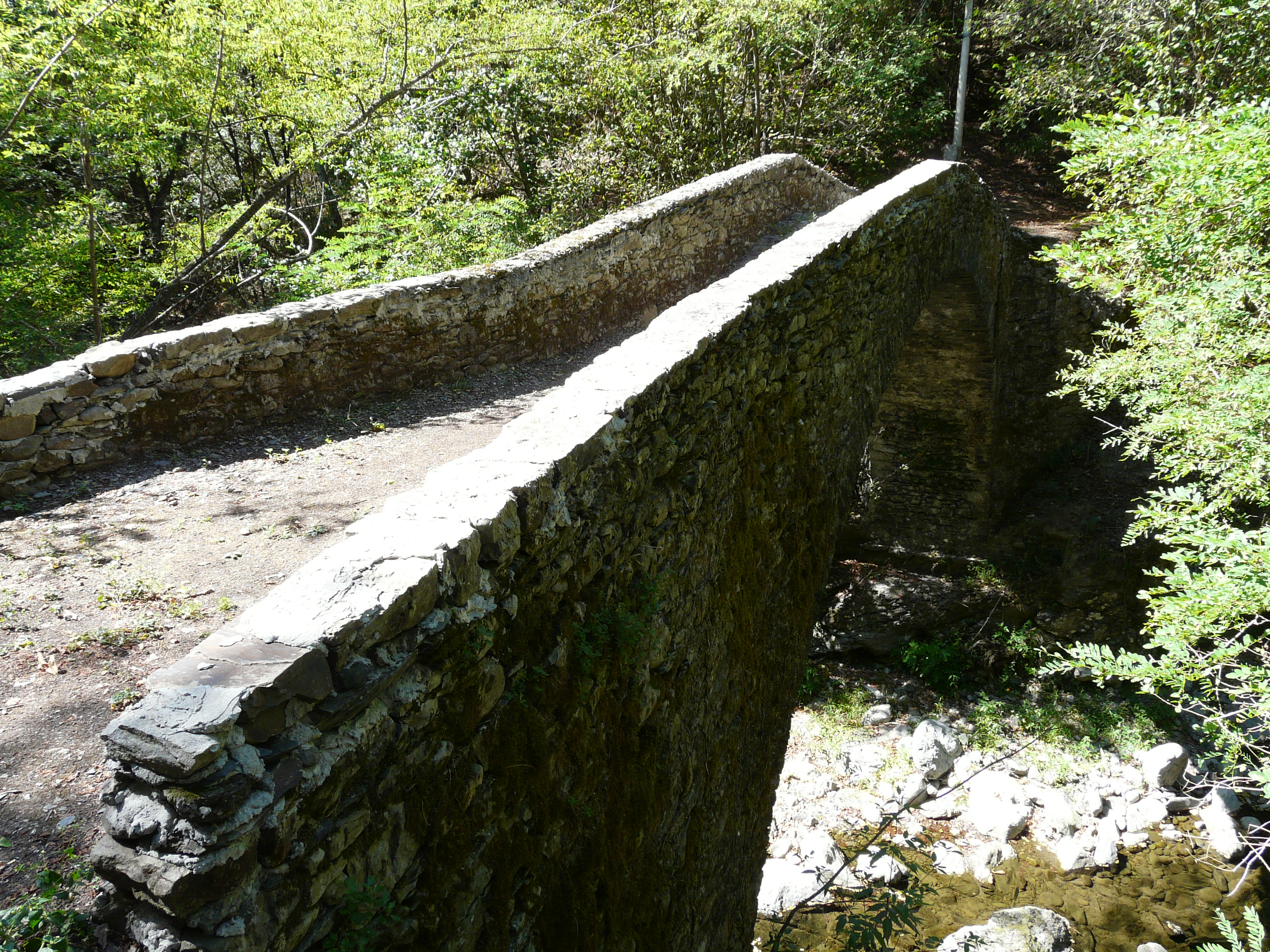 Ponte presso la frazione di Celesia, San Colombano Certenoli, Liguria, Italia